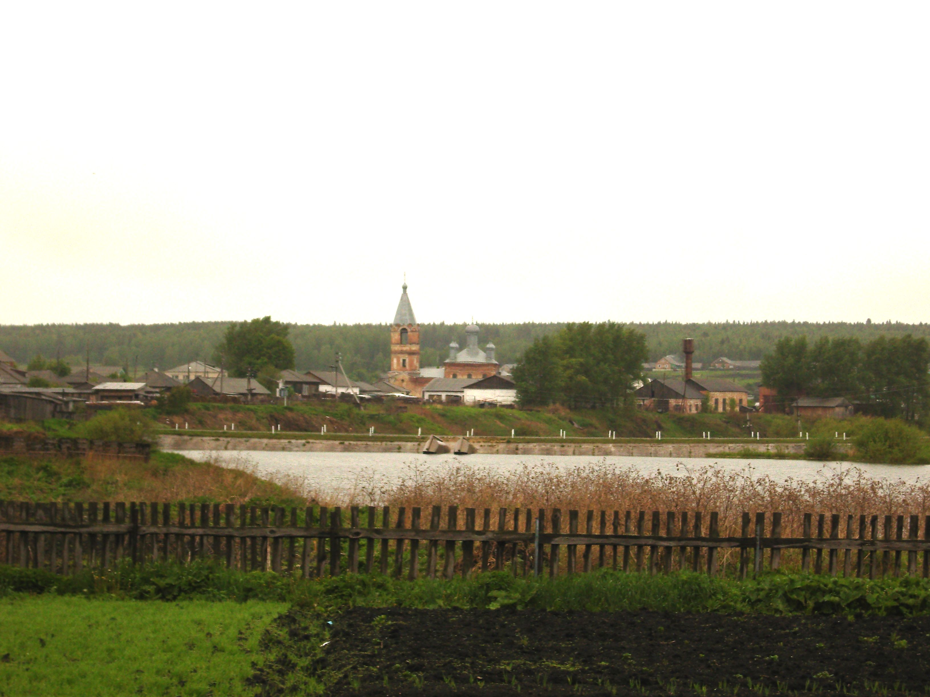 Плотина рядом со школой